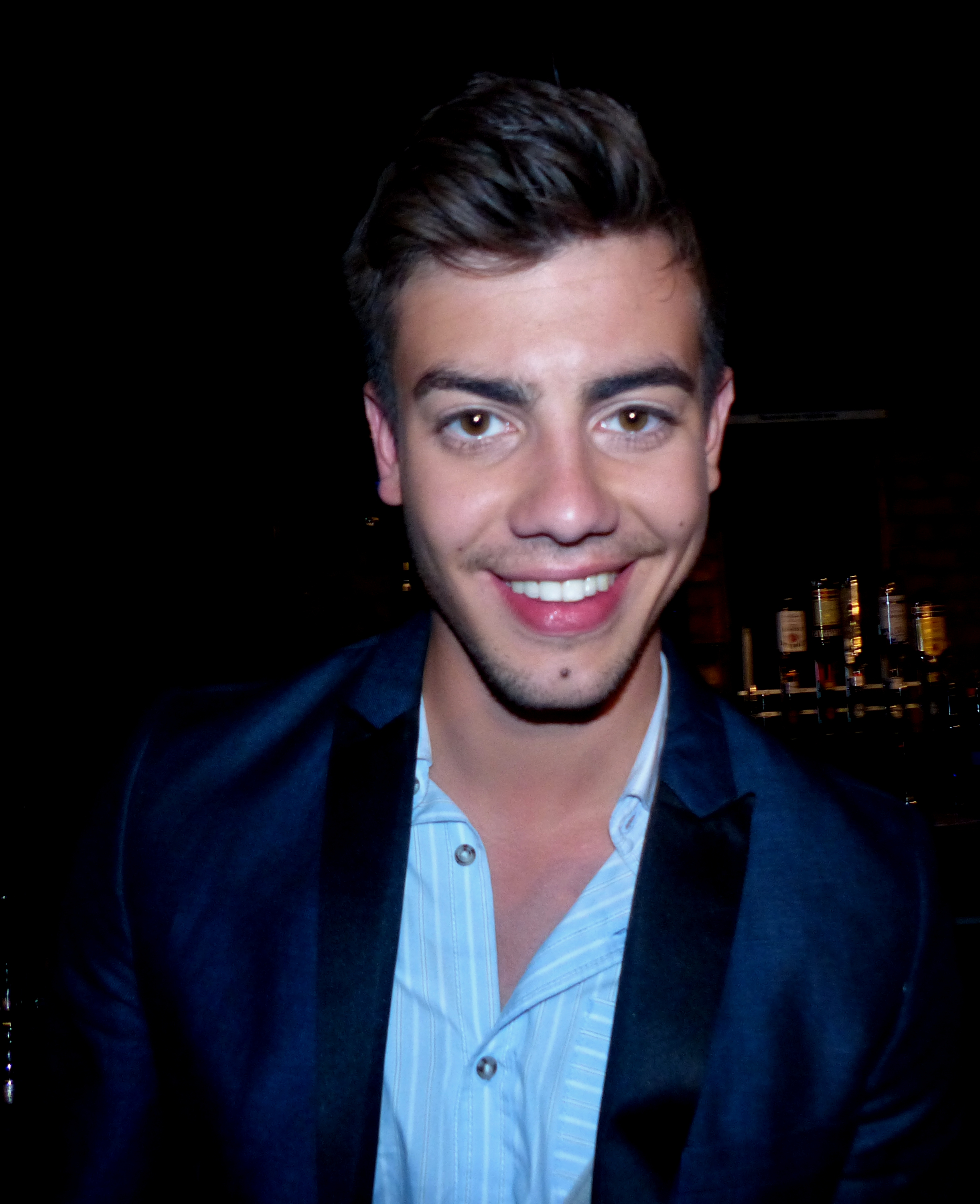 Florian Wünsche, 18. Jahre Verbotene Liebe Party, Düsseldorf